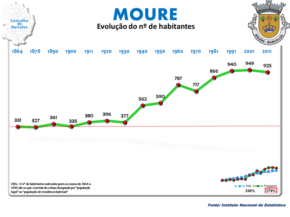 Cenos 1864/2011